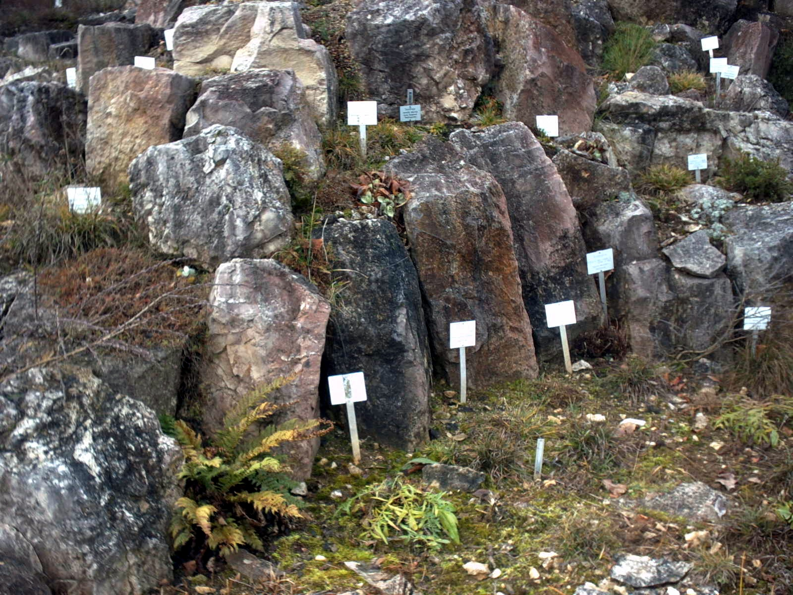 Tübingen - Neuer Botanischer Garten